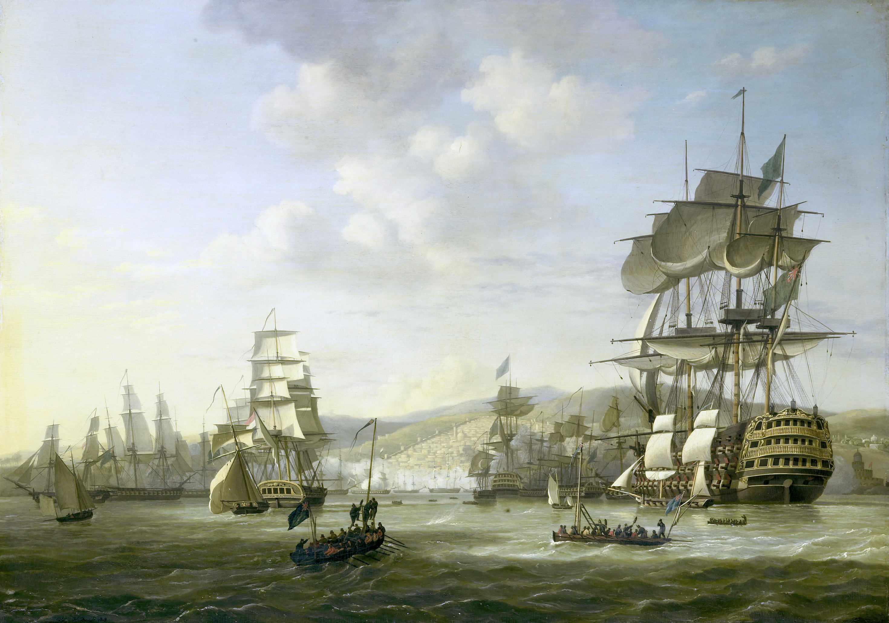 De Engels-Nederlandse vloot in de Baai van Algiers ter ondersteuning van het ultimatum tot vrijlating van blanke slaven, 26 augustus 1816. Rechts een groot oorlogsschip, vooraan enige sloepen.